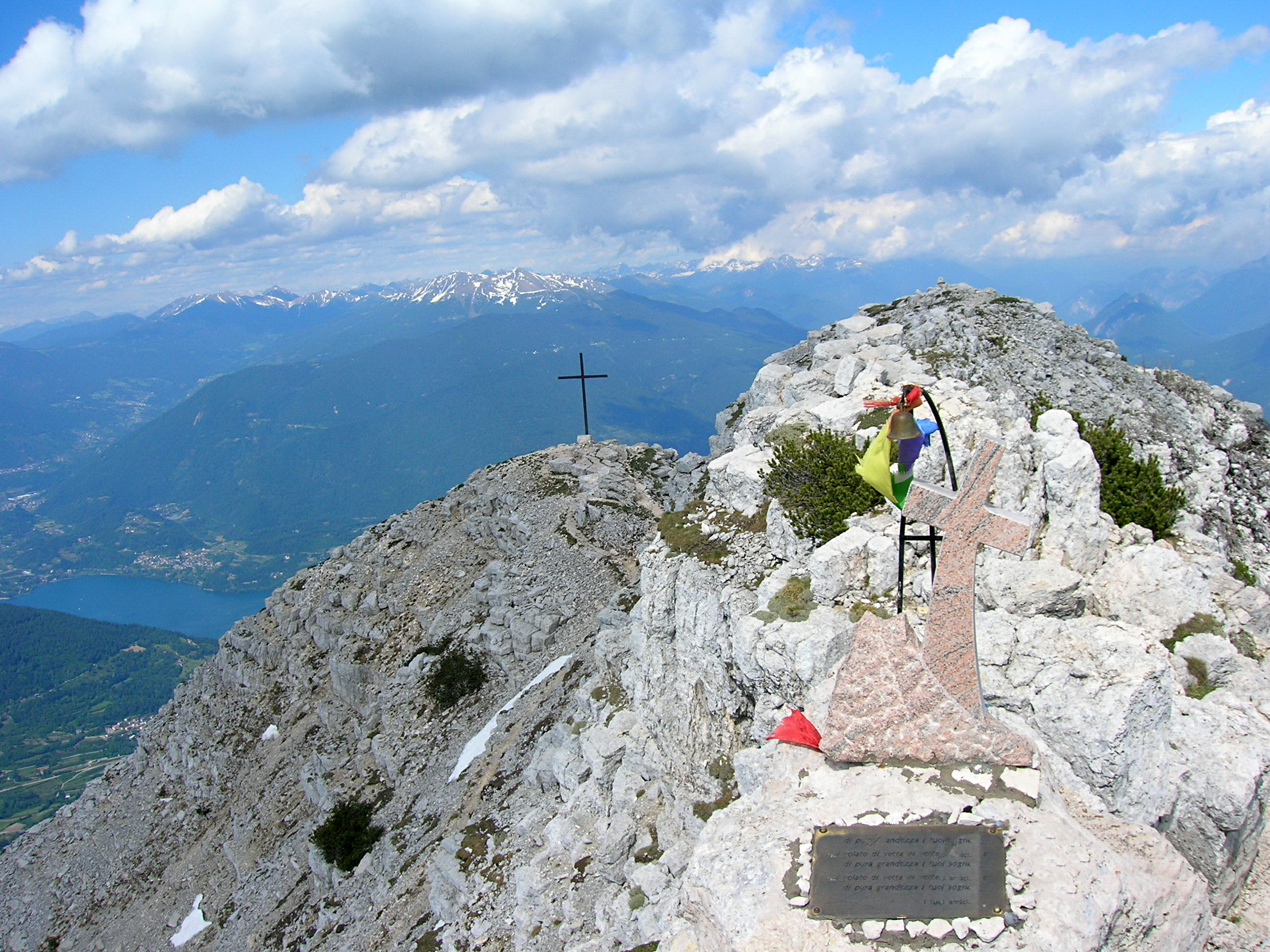 La vetta del Becco di Filadonna, in basso il lago di Caldonazzo